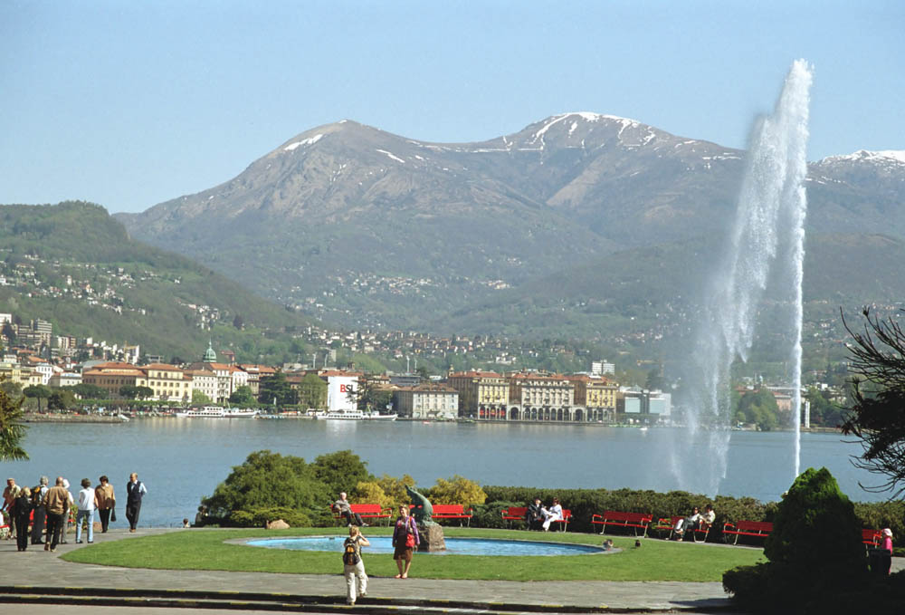 Lugano, fotografiert im April 2004 von Bernd Gehrmann, Lizenz: GFDL